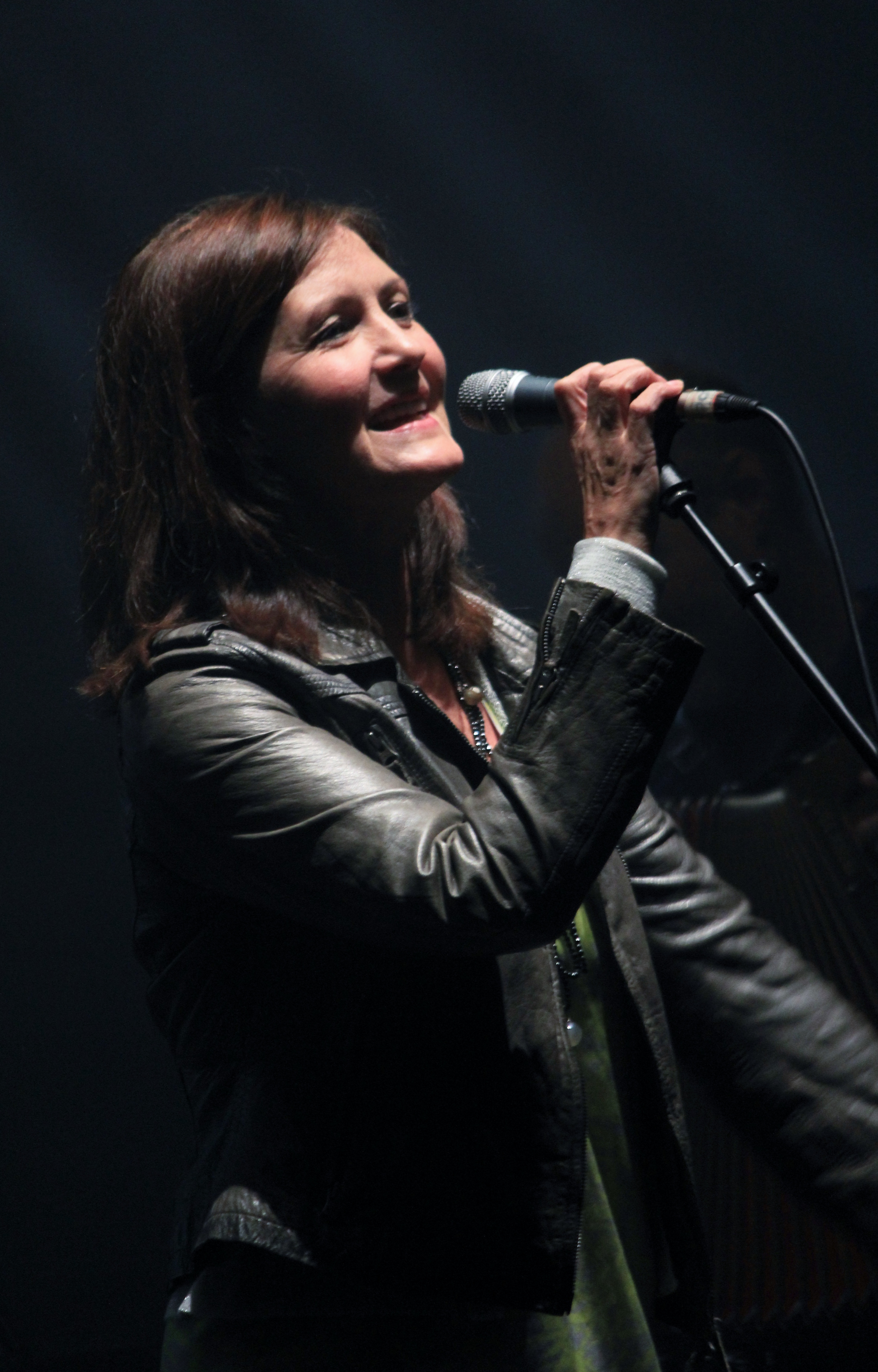 Karen Matheson lors d'un concert de Capercaillie au festival interceltique de Lorient 2013